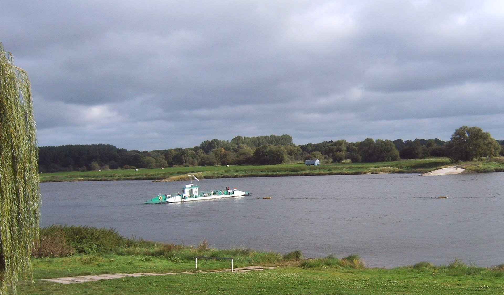 Gierfähre über die Elbe in Westerhüsen, Magdeburg, Sachsen-Anhalt